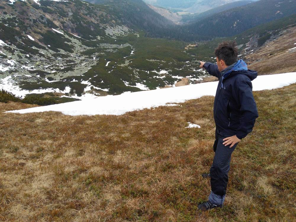 Martin Lavay při průzkumu "kamenného oka"